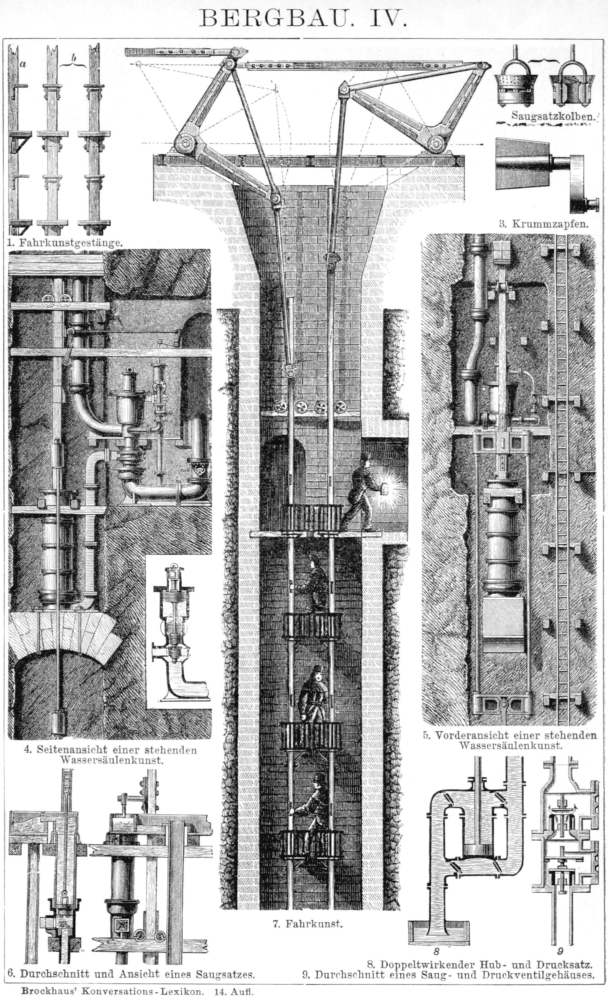 Tafel Bergbau IV aus dem Brockhaus Konversationslexikon, 14. Auflage 1897. Wassersäulenmaschine und Fahrkunst